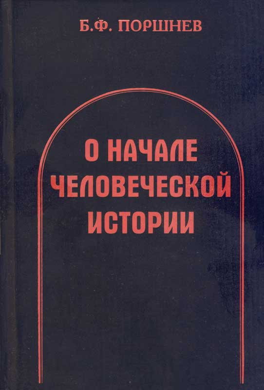 Обложка издания 2006